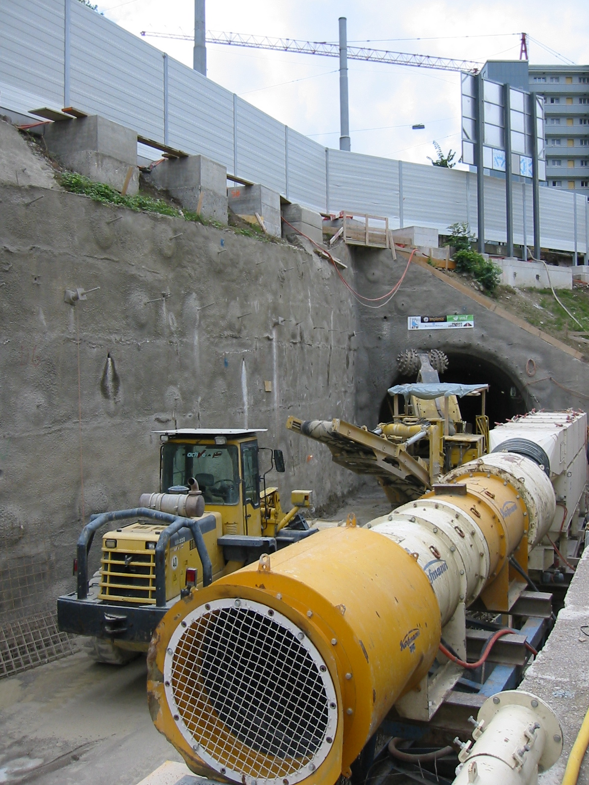 Eingang Portal zur der Durchmesserlinie von Altstetten-Zürich HB-Oerlikon. Zu sehen am Tag der Offenen Baustelle.